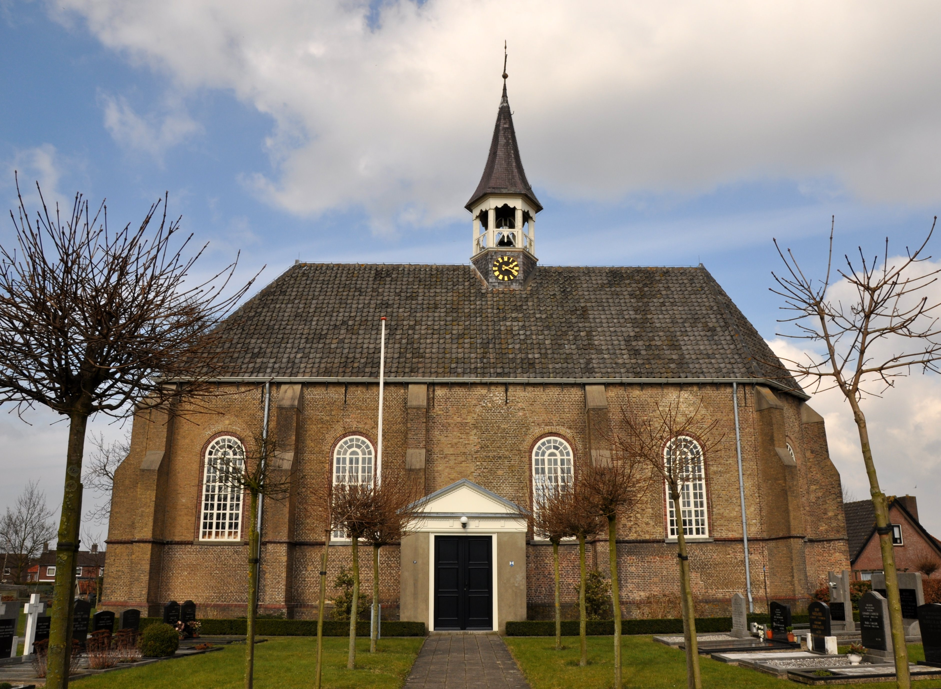 Ned. Hervormde Kerk Made klik op 'Monument' '